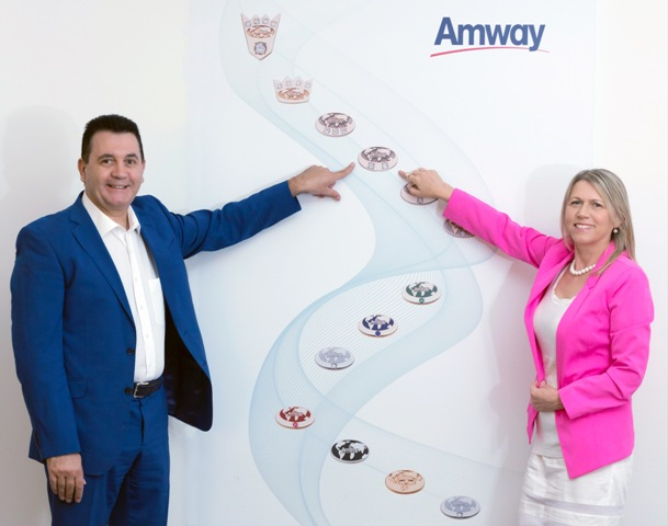 Foto de pareja